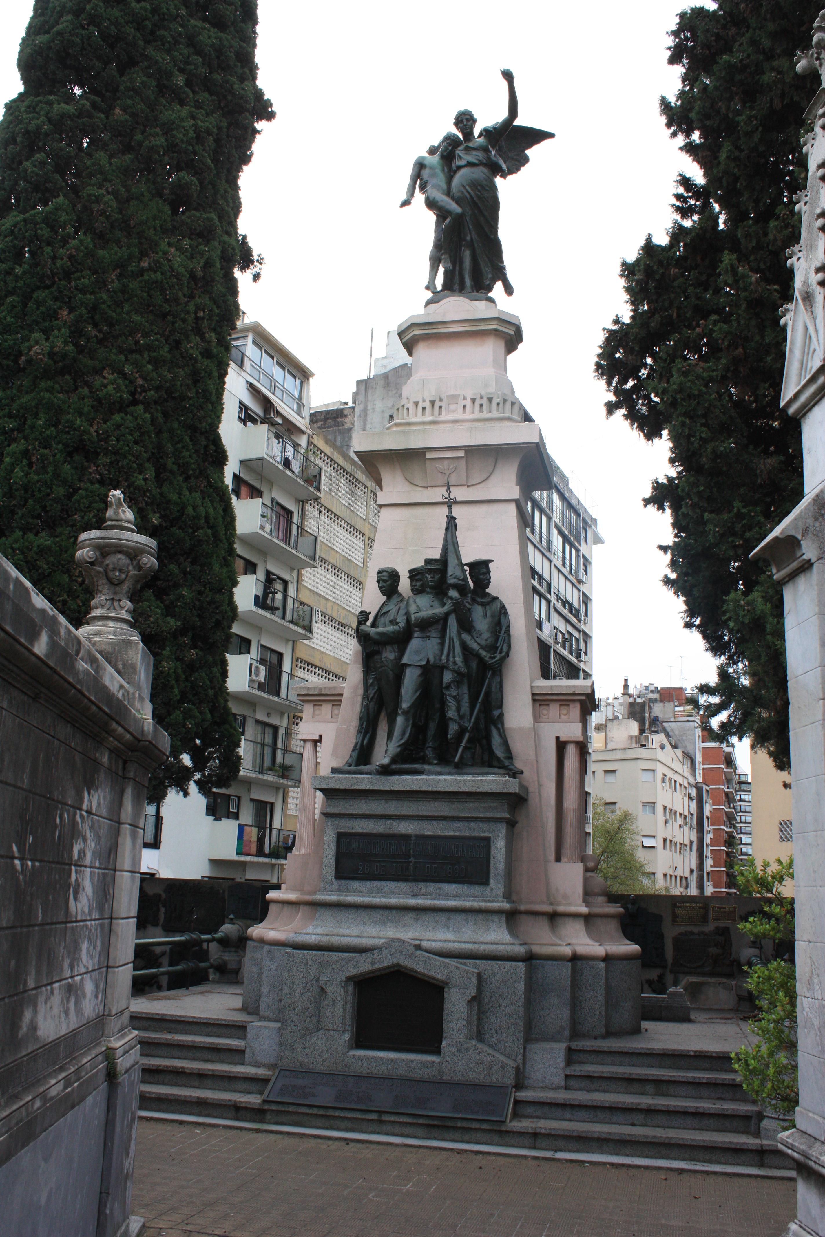 Sepulcro de los caídos en la Revolución de 1890 - L. N. Alem y H. Yrigoyen